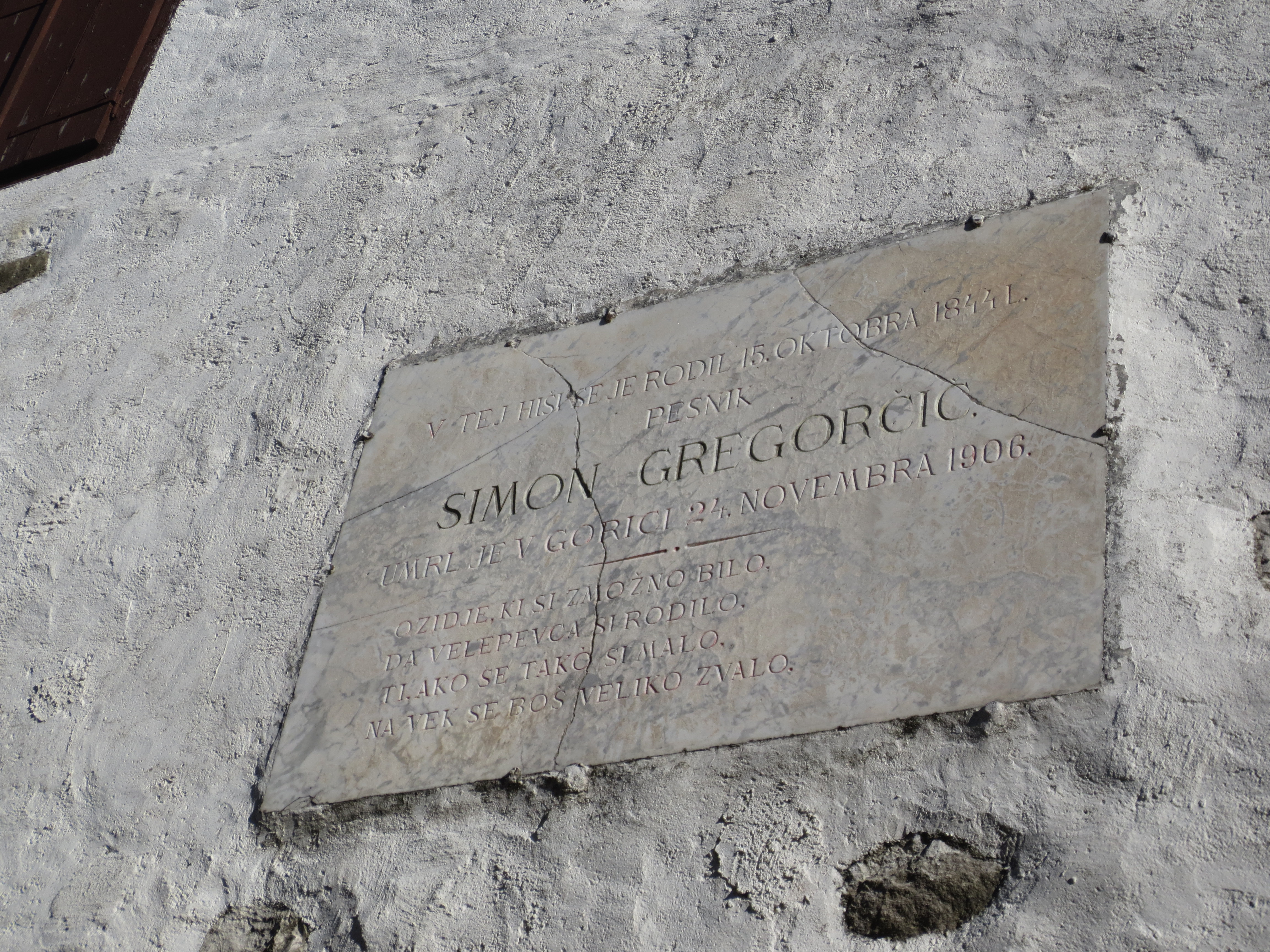 Spominska plošča na Gregorčičevi rojstni hiši